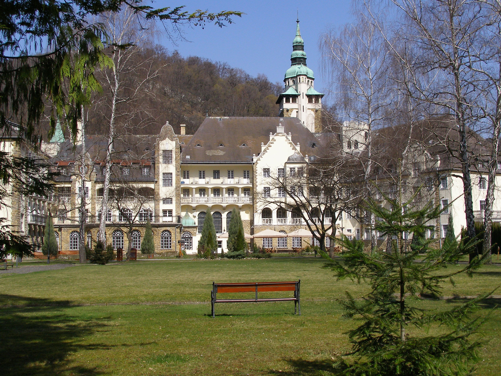 Palotaszálló (Miskolc, Miskolc-Lillafüred) This is a photo of a monument in Hungary. Identifier: 12378